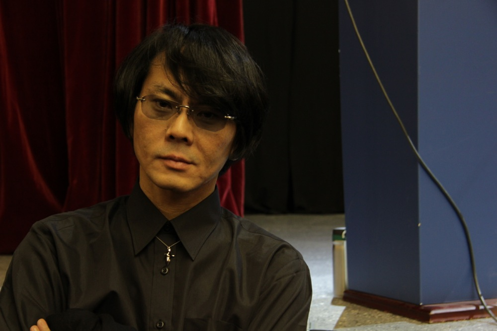 Hiroshi Ishiguro (Хироси Исигуро)